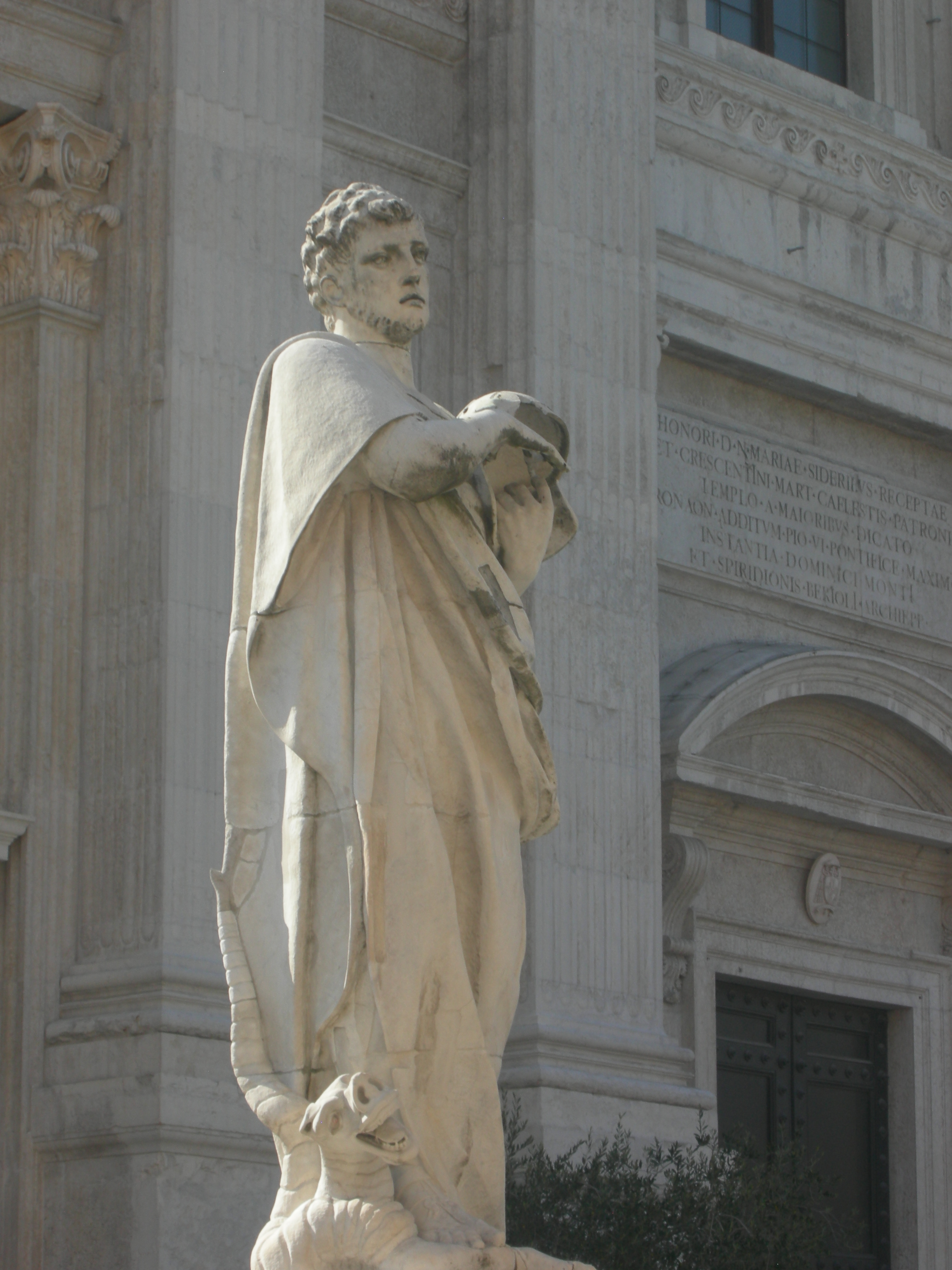 Statua di San Crescentino davanti al Duomo di Urbino, Italia.